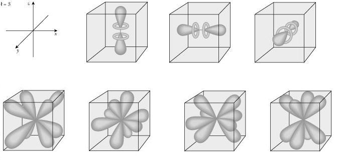 De Enciclopedia Libre. Imágenes generadas con el programa Orbital Viewer, (C) David Manthey esto esta del asco